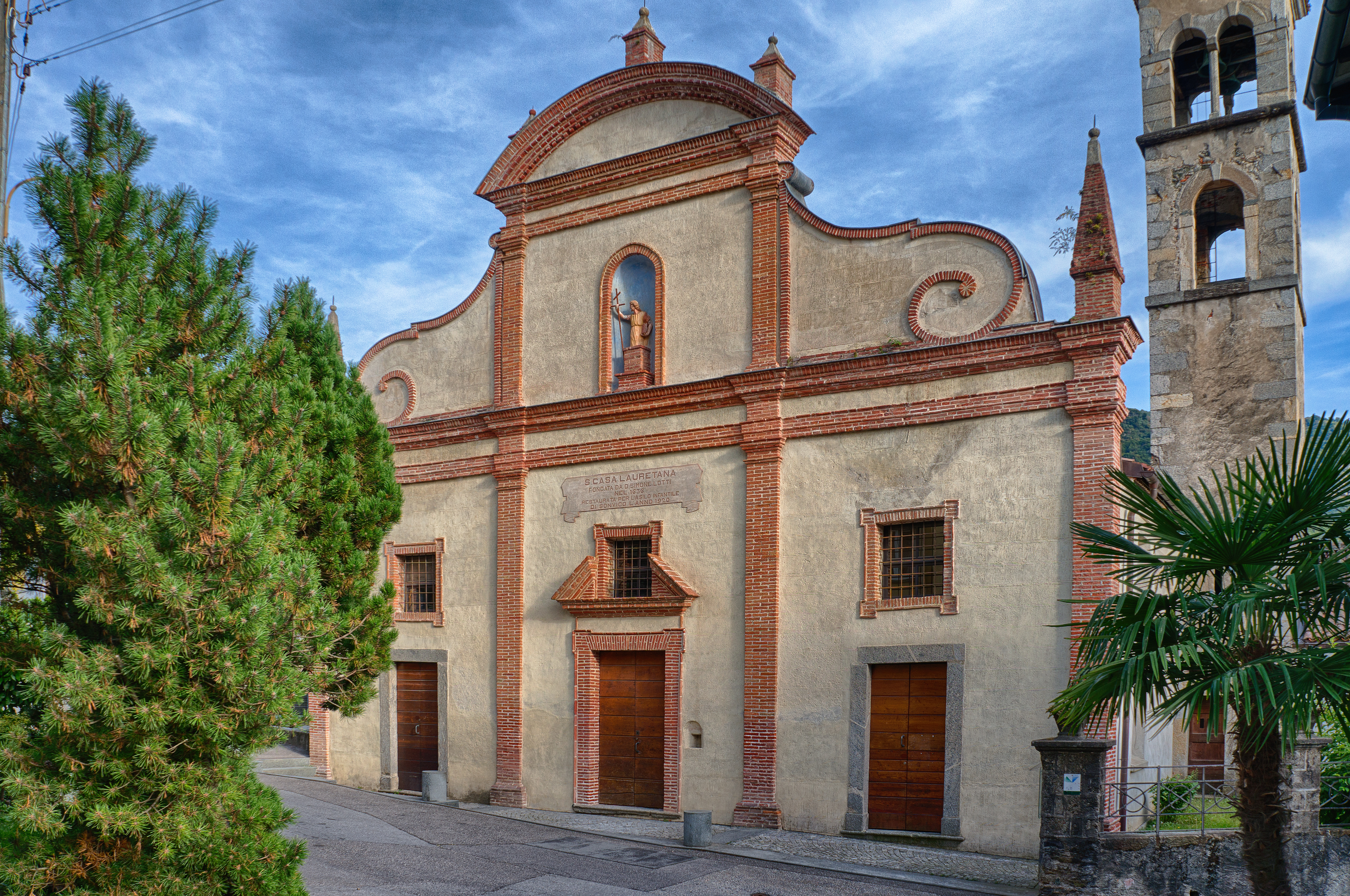 Santa Casa Lauretana